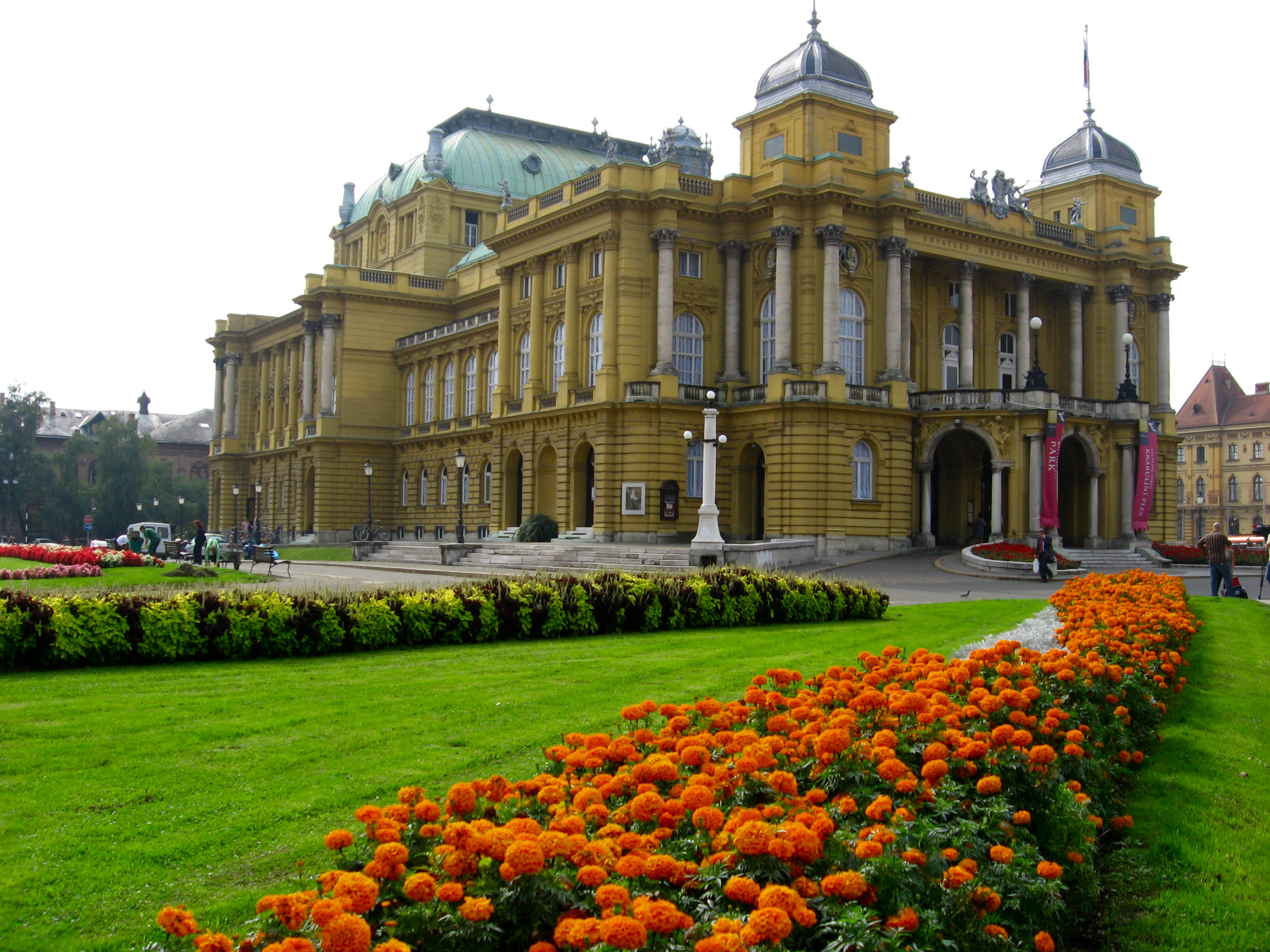 Hrvatsko narodno kazalište u Zagrebu (Croatian national theater in Zagreb).